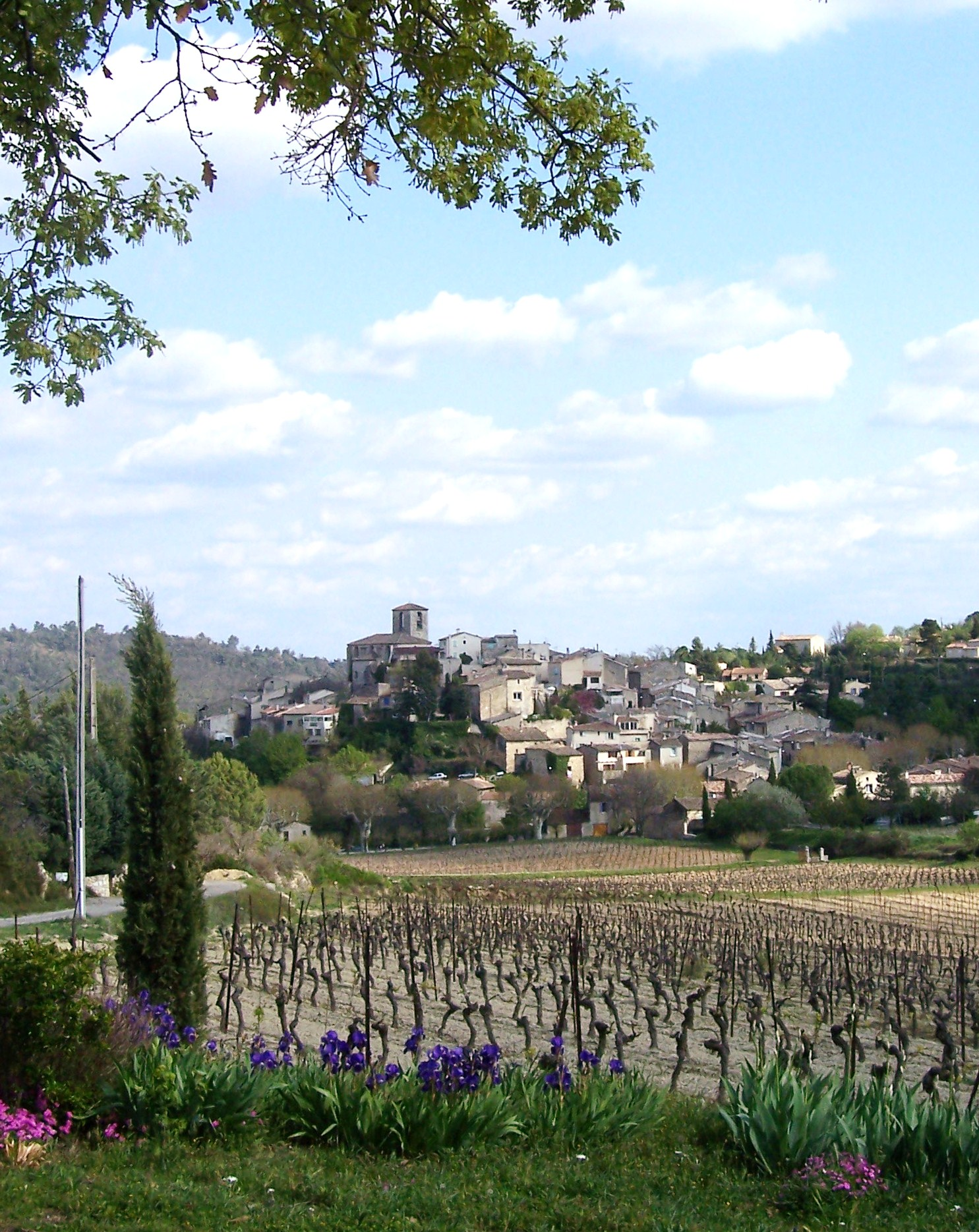 le village de Beaumont et les vignes en allant vers Mirabeau